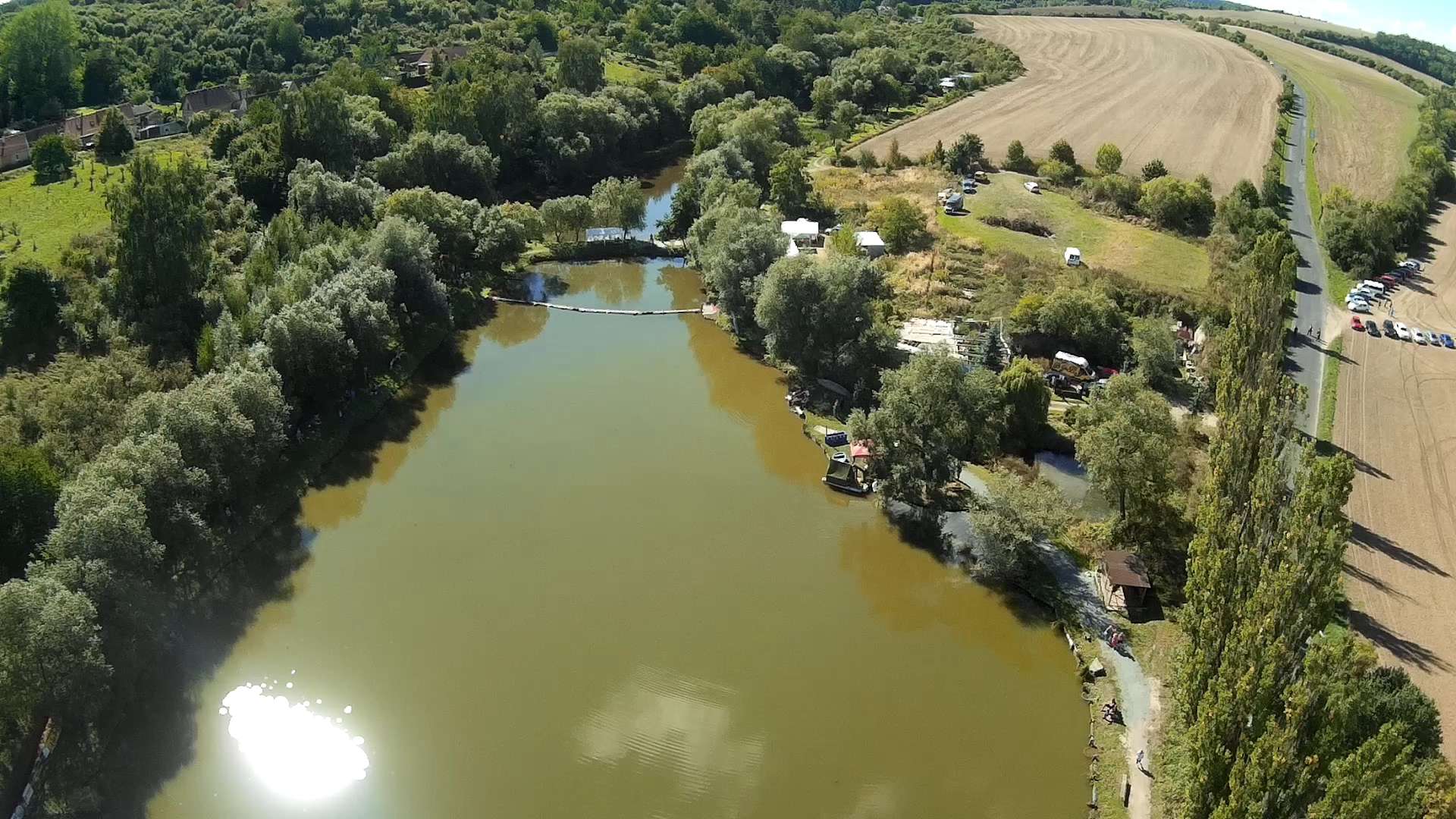 Soubor 5 rybníků s přírodní samočistící schopností